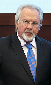 Председатель Общественного совета при Министерстве обороны Российской Федерации Павел Николаевич Гусев